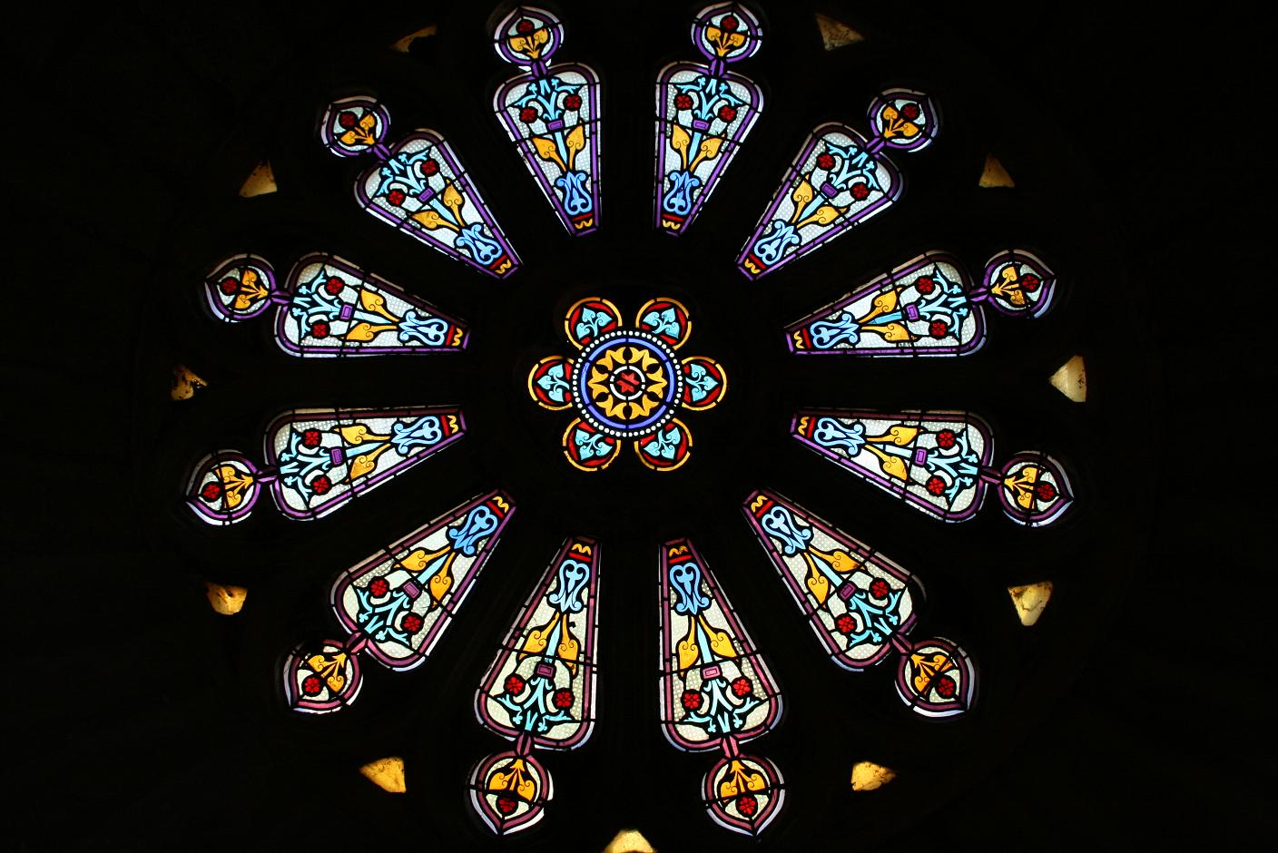 Cassagnes-Bégonhès (Aveyron - France) - Église - Rosace